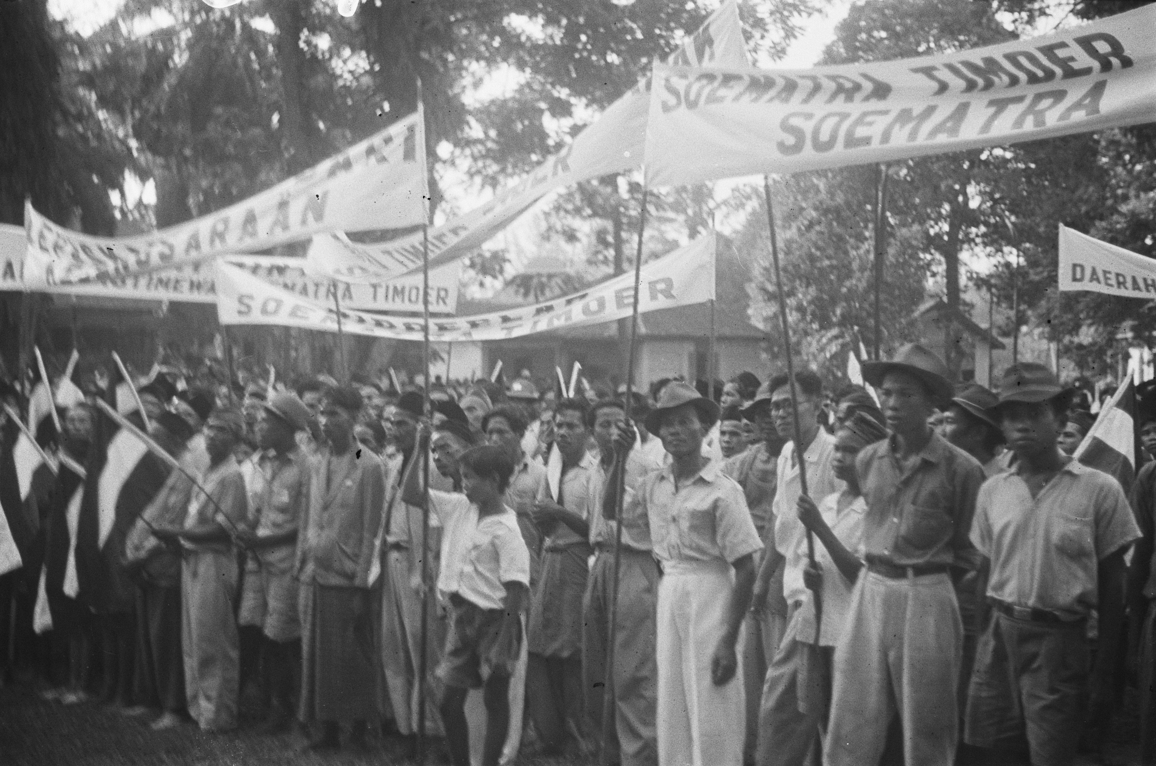 Collectie / Archief : Fotocollectie Dienst voor Legercontacten Indonesië Reportage / Serie : [DLC] Massademonstratie te Medan Beschrijving : Medan: duizenden Oost-Sumatranen hielden te Medan een massademonstratie nadat het gewest door de Nederlandse troepen bevrijd was. Zij boden een verzoekschrift aan ter verkrijging van een zelfstandige staat Oost-Sumatra: Soematera Timoer in het kader van de overeenkomst van Linggadjati. De demonstranten luisterend naar Dr. J.J. van der Velde, de Recomba voor Noord-Sumatra, die namens de Nederlandse regering het adres beantwoordde Datum : 1947 Locatie : Indonesië, Nederlands-Indië, Sumatra Fotograaf : Kalken, van / DLC Auteursrechthebbende : Nationaal Archief Materiaalsoort : Negatief (zwart/wit) Nummer archiefinventaris : bekijk toegang 2.24.04.03 Bestanddeelnummer : 326-6-2